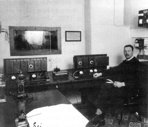 Hlasatelna brněnského rozhlasového studia v roce 1928